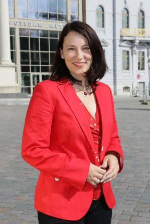 Foto der Direktorin des Potsdam Museums.